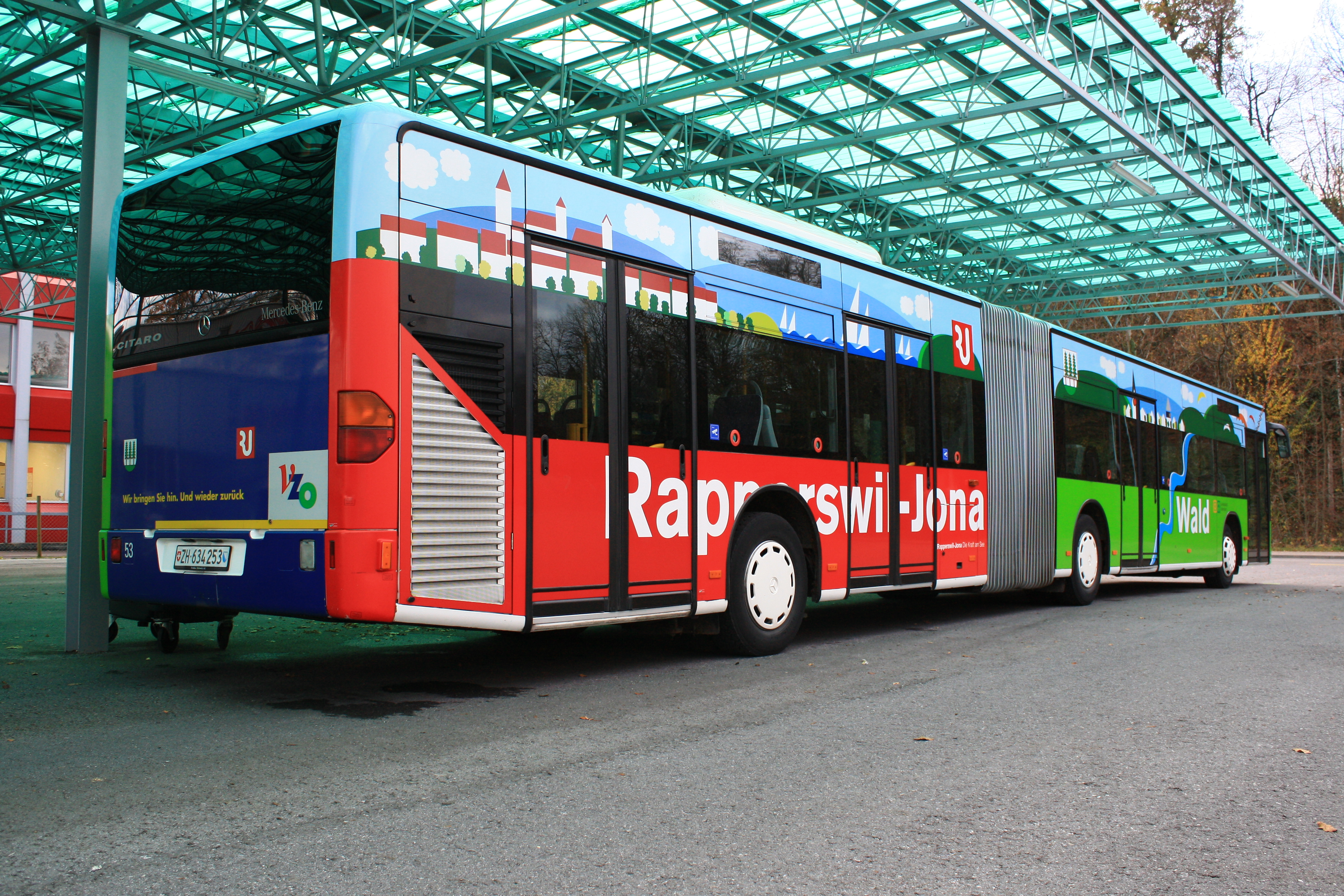 Verkehrsbetriebe Zürichsee und Oberland (VZO) depot at Werkstrasse in Rüti (ZH)